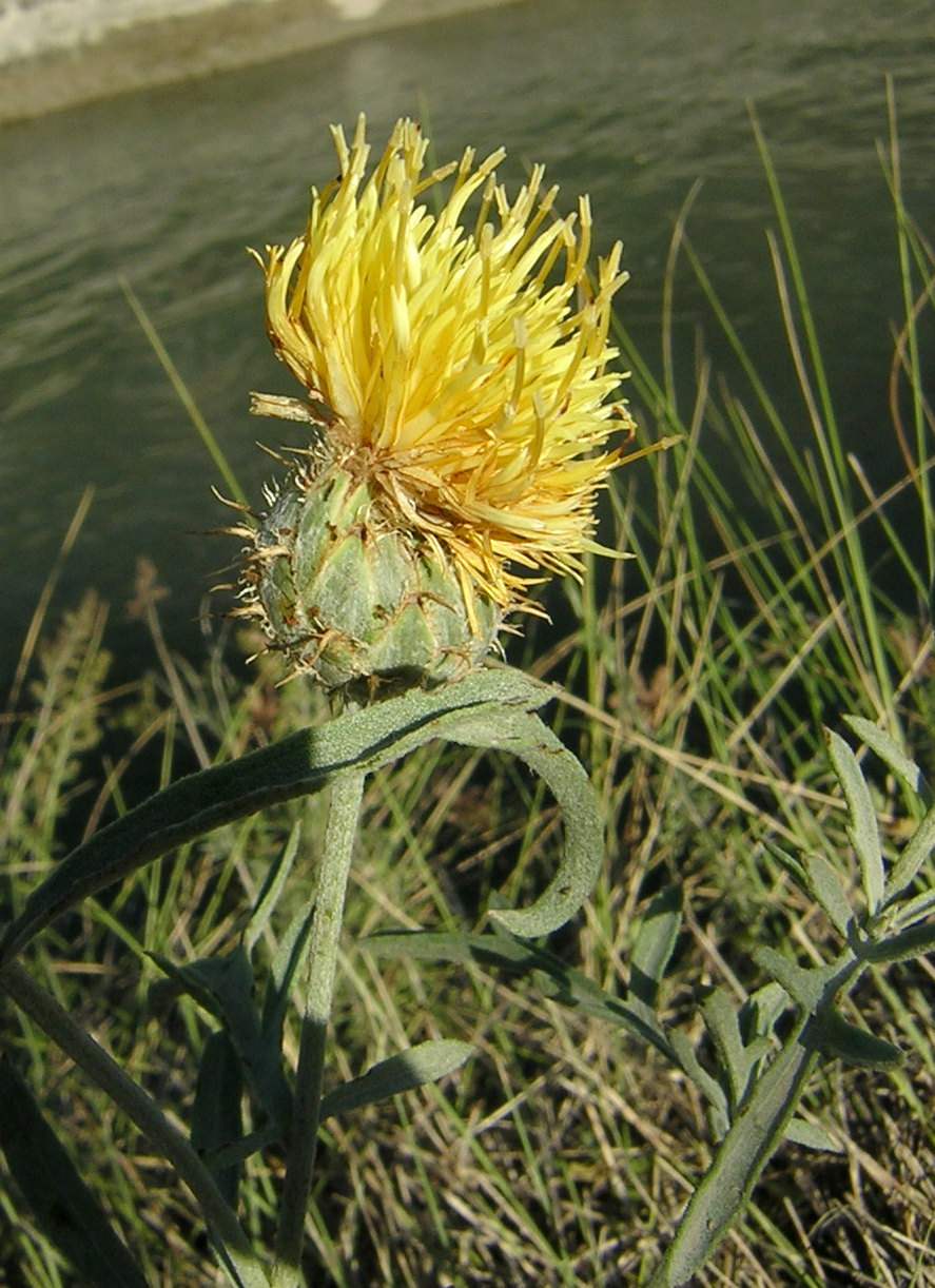 Centaurea collina, à Pernes-les-Fontaines (Vaucluse, France)